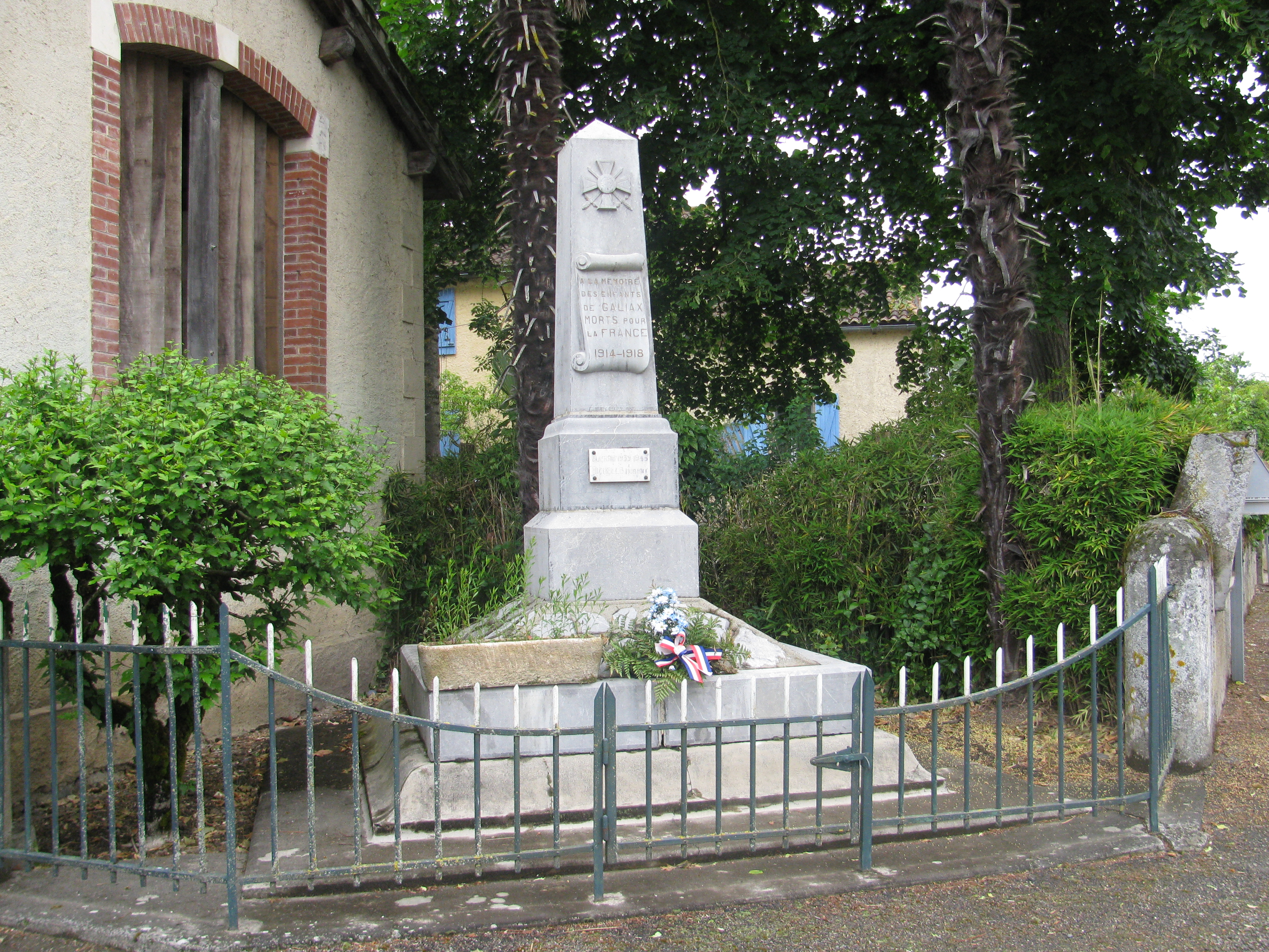 monument aux morts de Galiax